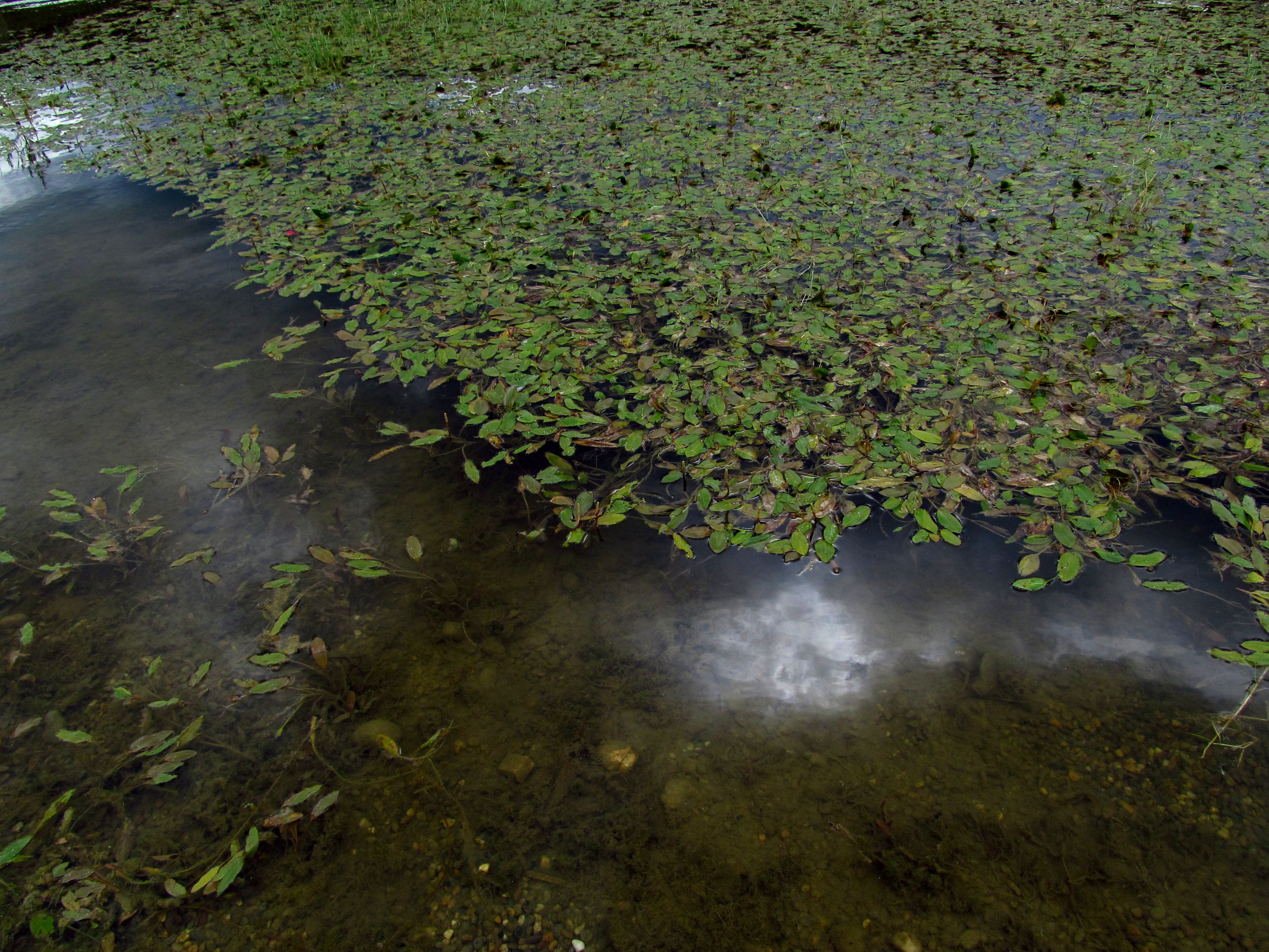 Srpski (latinica): talasinje (Potamogeton)